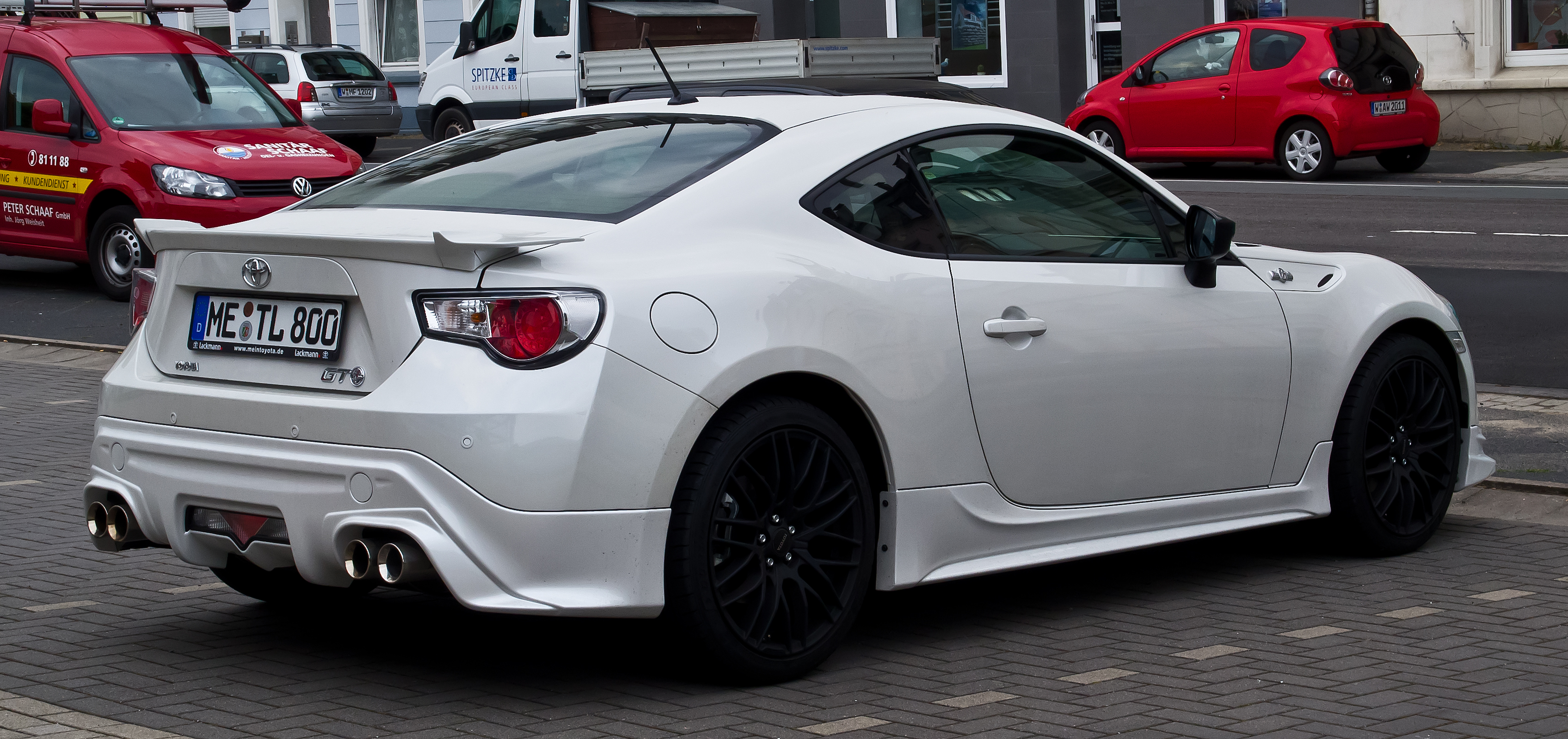 Toyota GT86